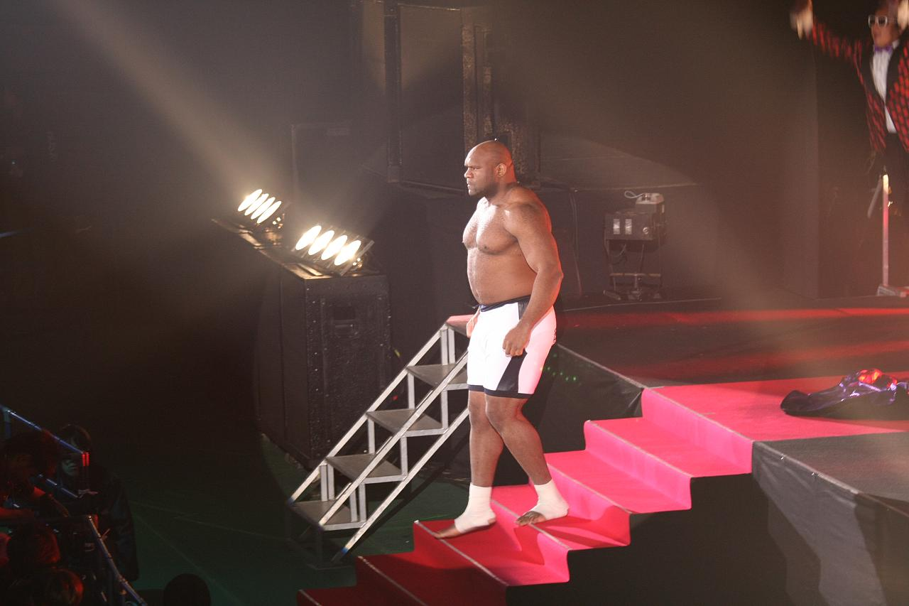 Bob Sapp